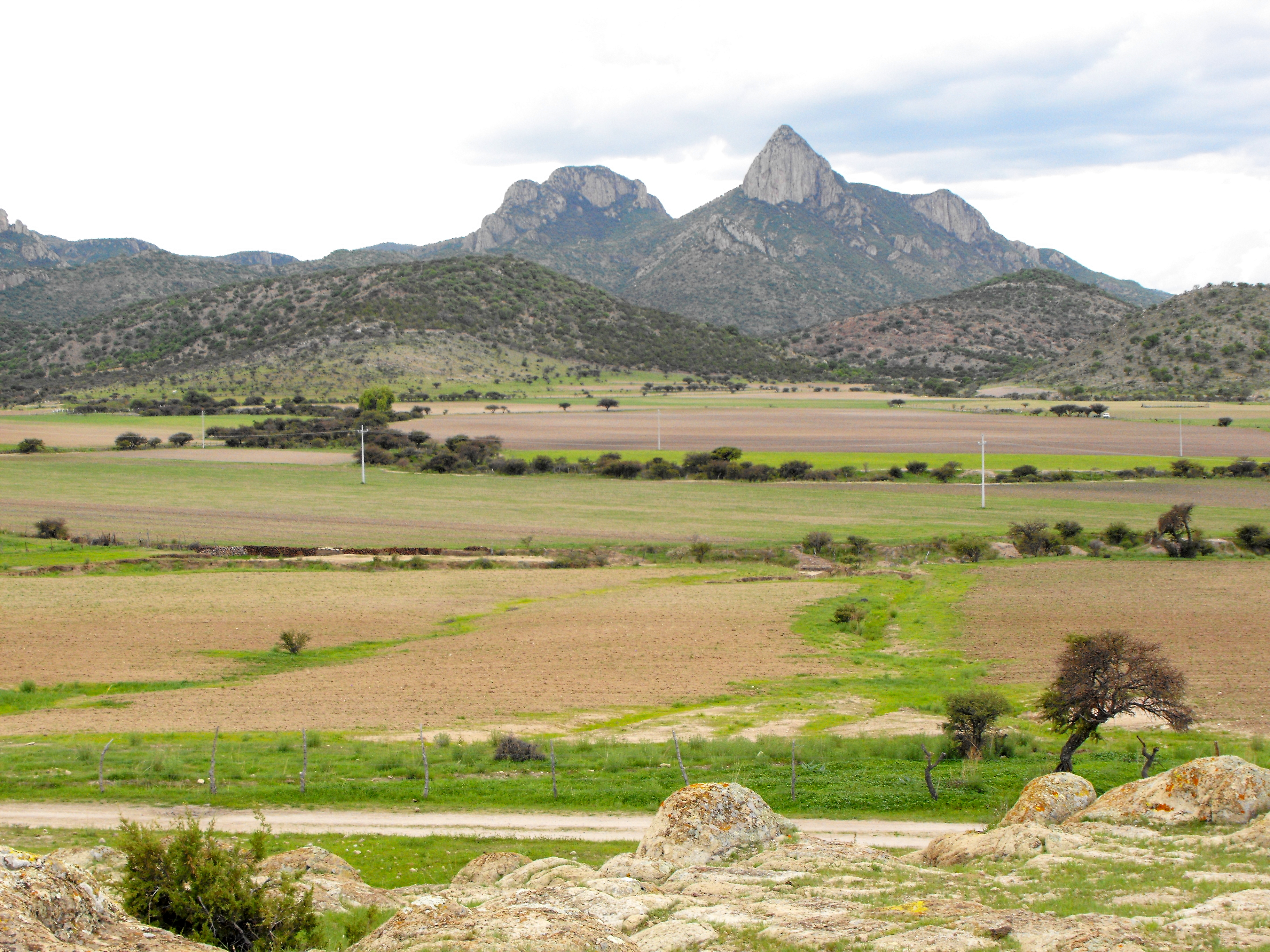 El Picacho desde la entrada